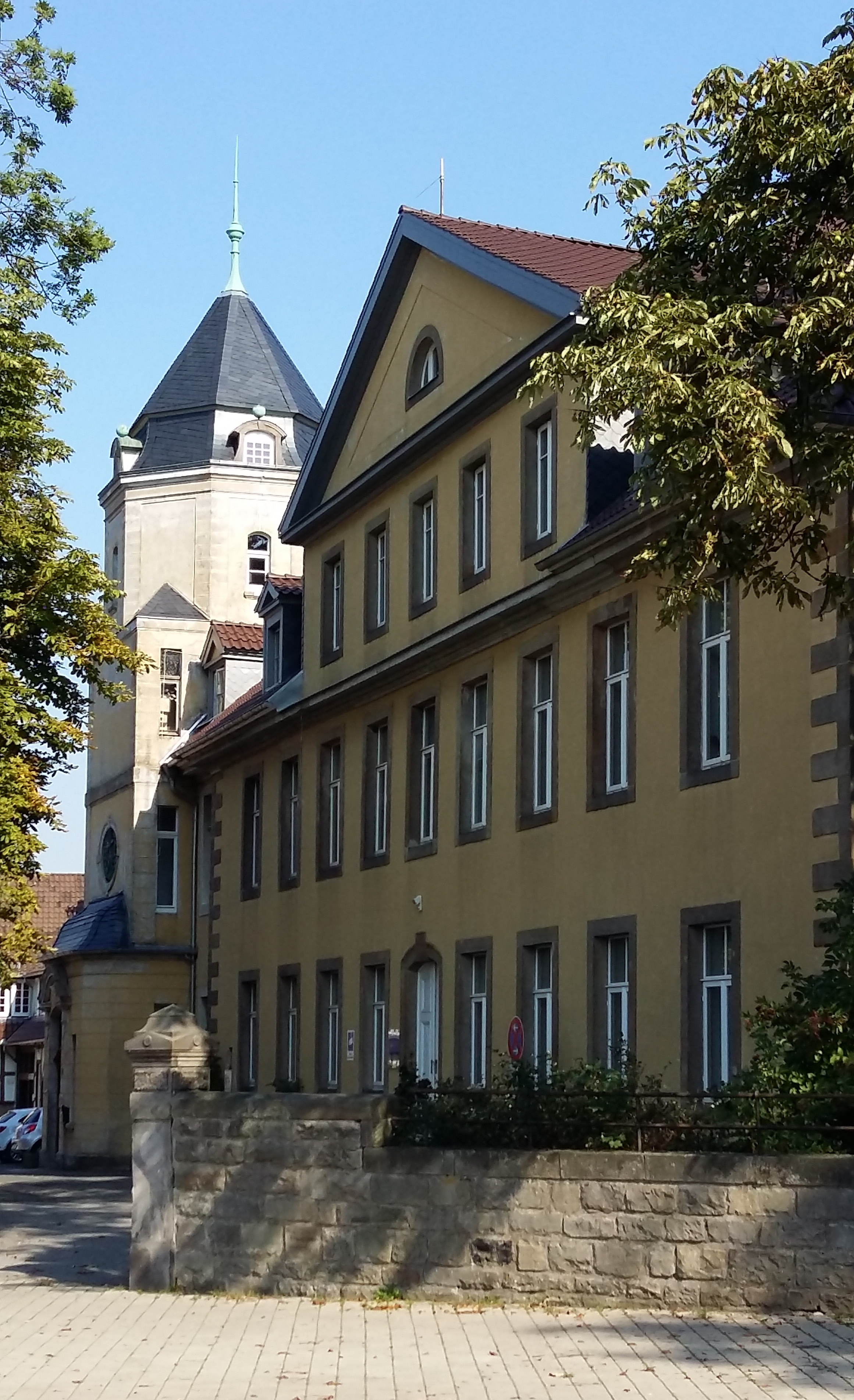 Ilten, Klinikum Wahrendorff im ehemaligen Amtshaus des Amts Ilten.